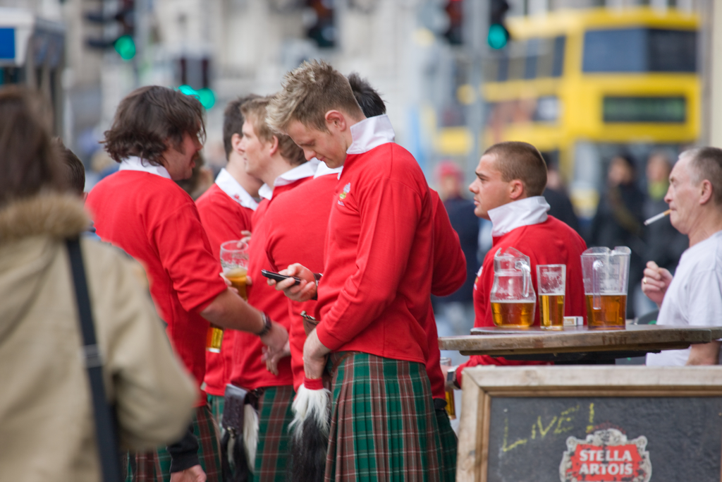 Welsh Rugby Supporters Streets Of Dublin - Supporters gallois de rugby à XV dans les rues de Dublin pour le tournoi des six nations 2008. Le 8 mars 2008 à 13h15 : Irlande 12 - 16 Galles en route pour le Grand Chelem